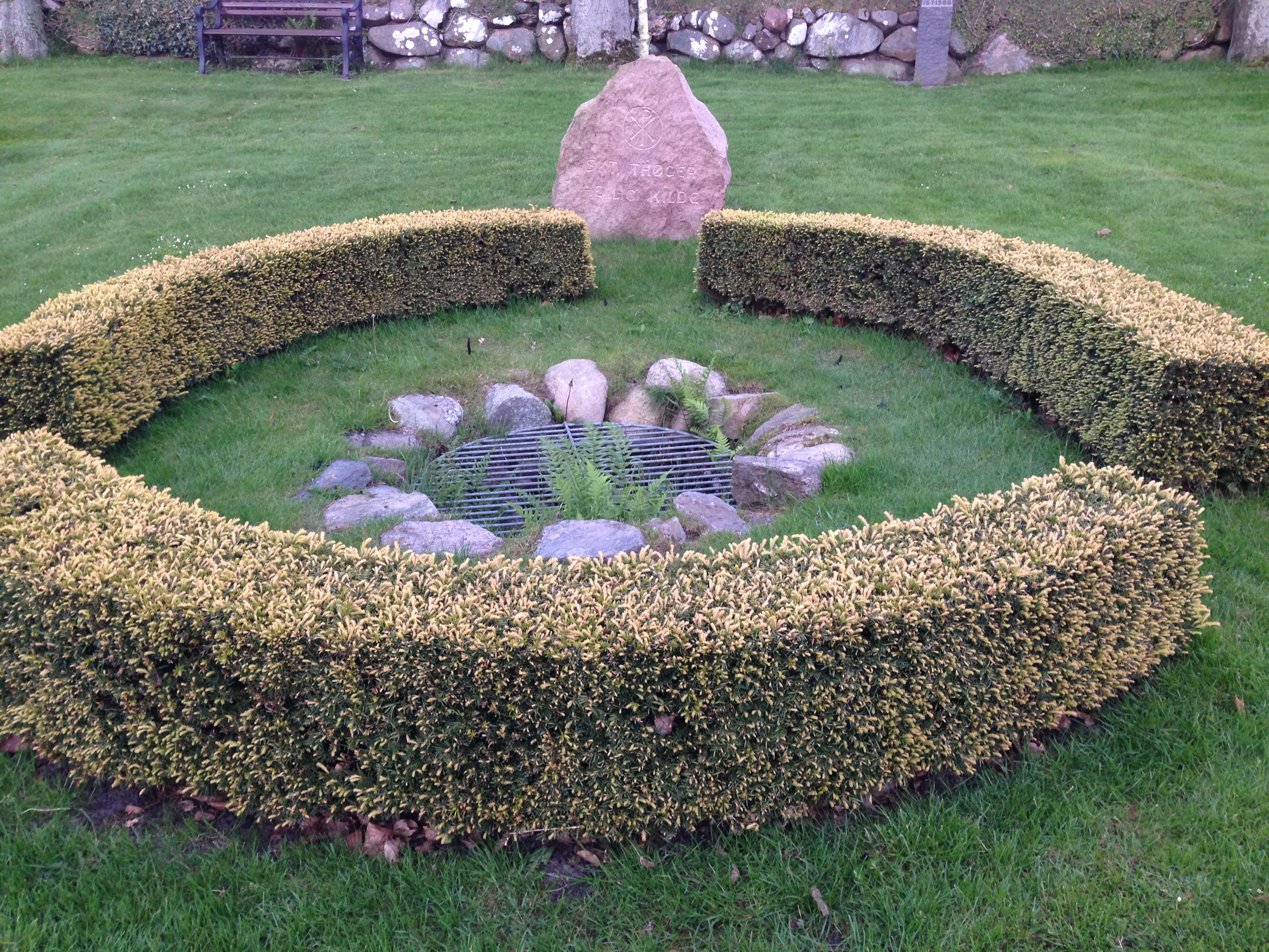 Sct. Thøger Hellig Kilde